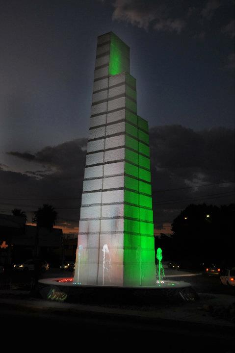 Fuente de los tres bulevares: Kino, Rodriguez y Morelos.